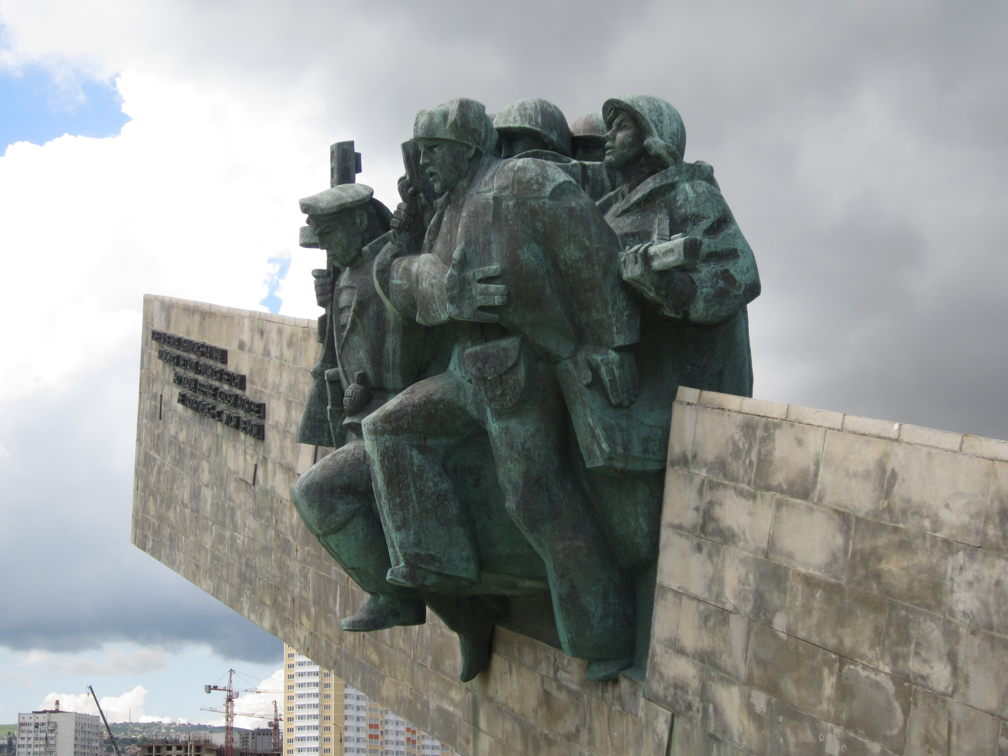 Мемориал «Малая земля» с галереей боевой славы: проспект Ленина, Новороссийск, Краснодарский край